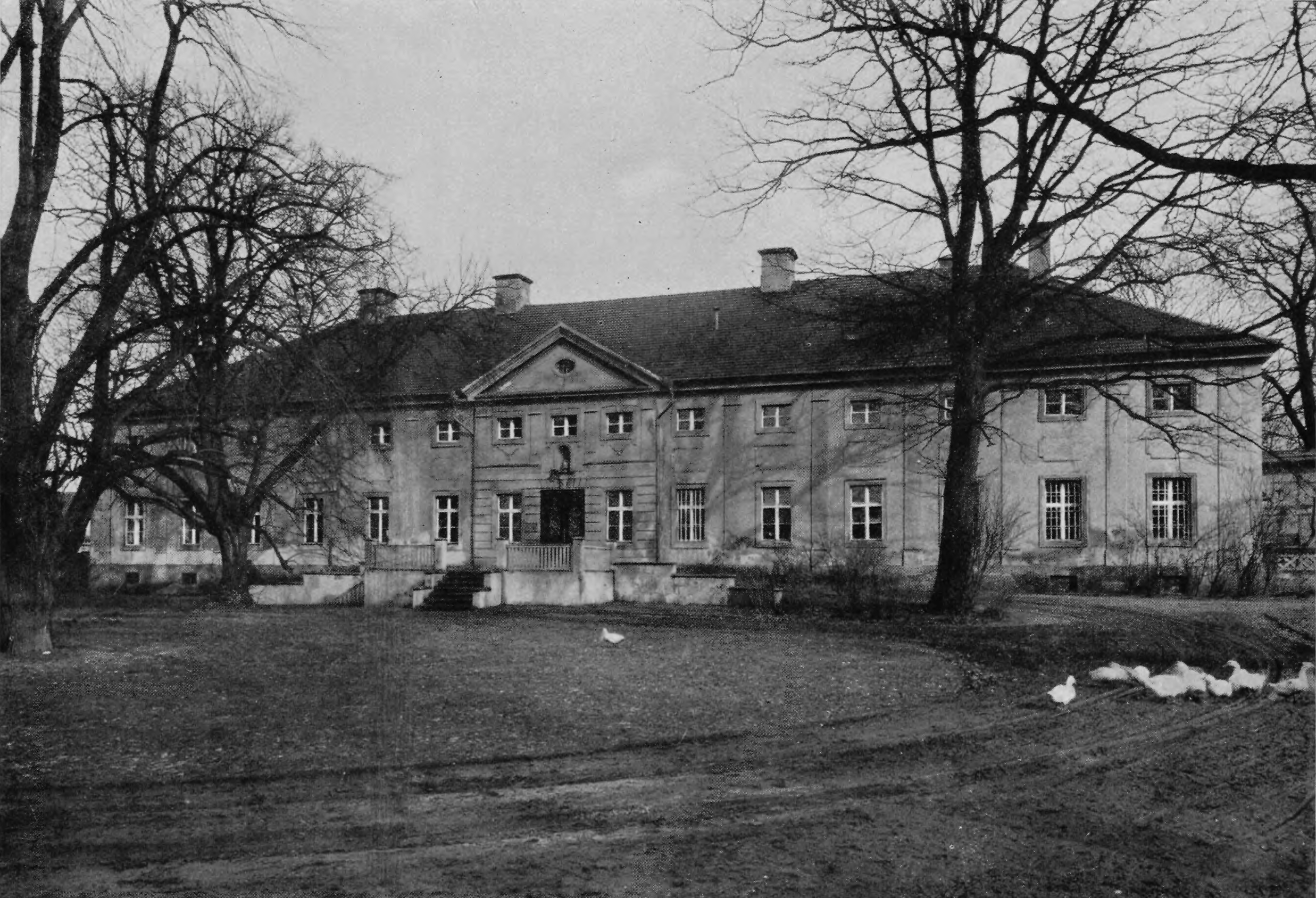 Das Gutshaus/Schloss in Schönfeld bei Konstadt in Oberschlesien. Erbaut um 1770.